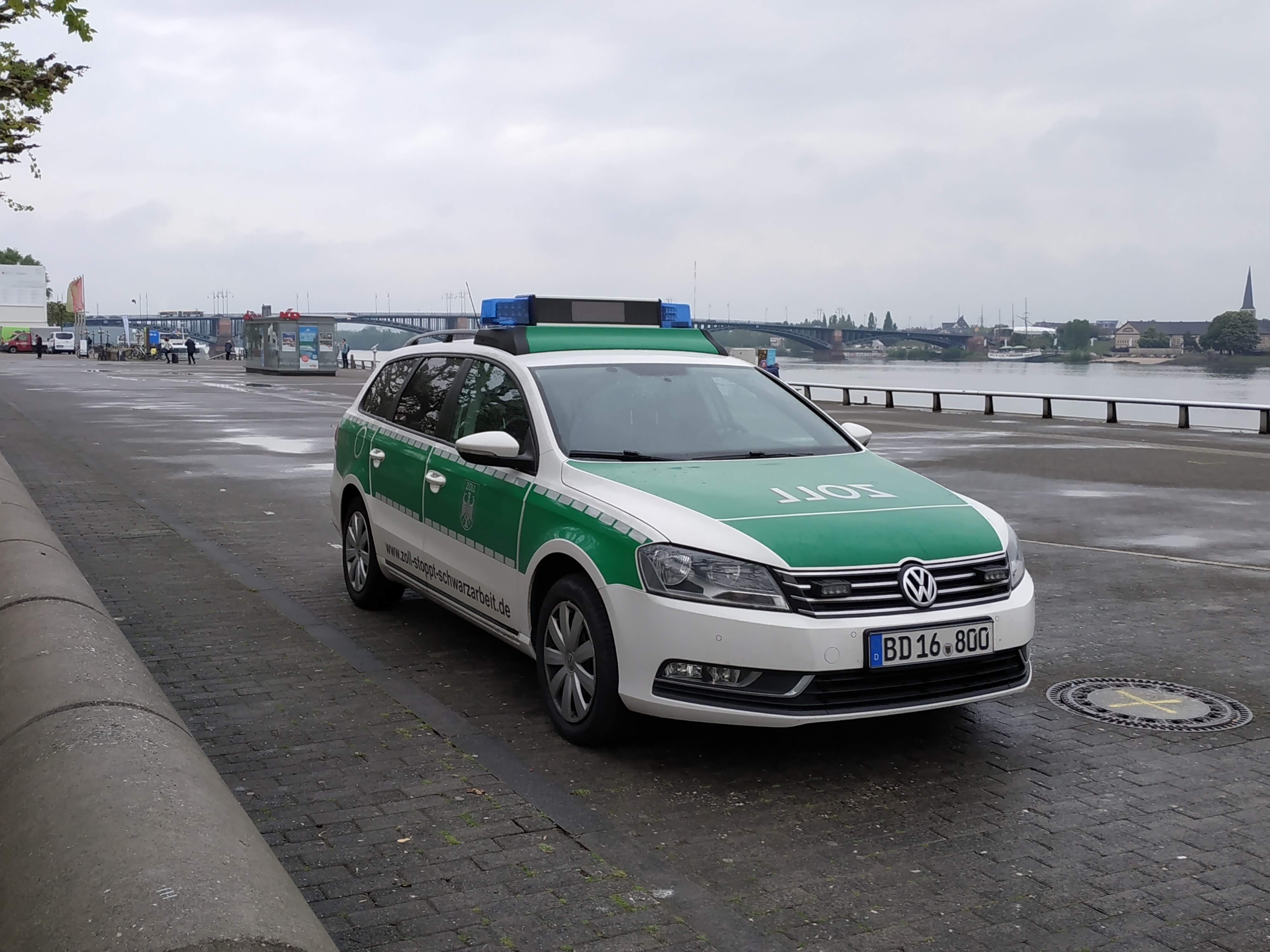 Douane allemande à Mayence